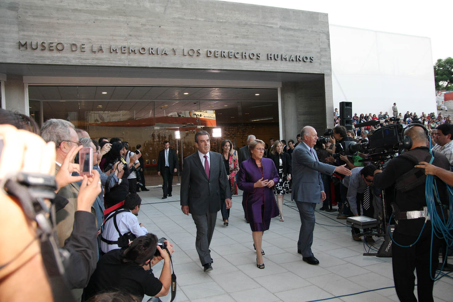 Con la presencia de la Presidenta de la República Michelle Bachelet fue inaugurado el Museo de la Memoria y los Derechos Humanos que será un espacio de reflexión sobre las violaciones a la dignidad humana durante la dictadura militar.